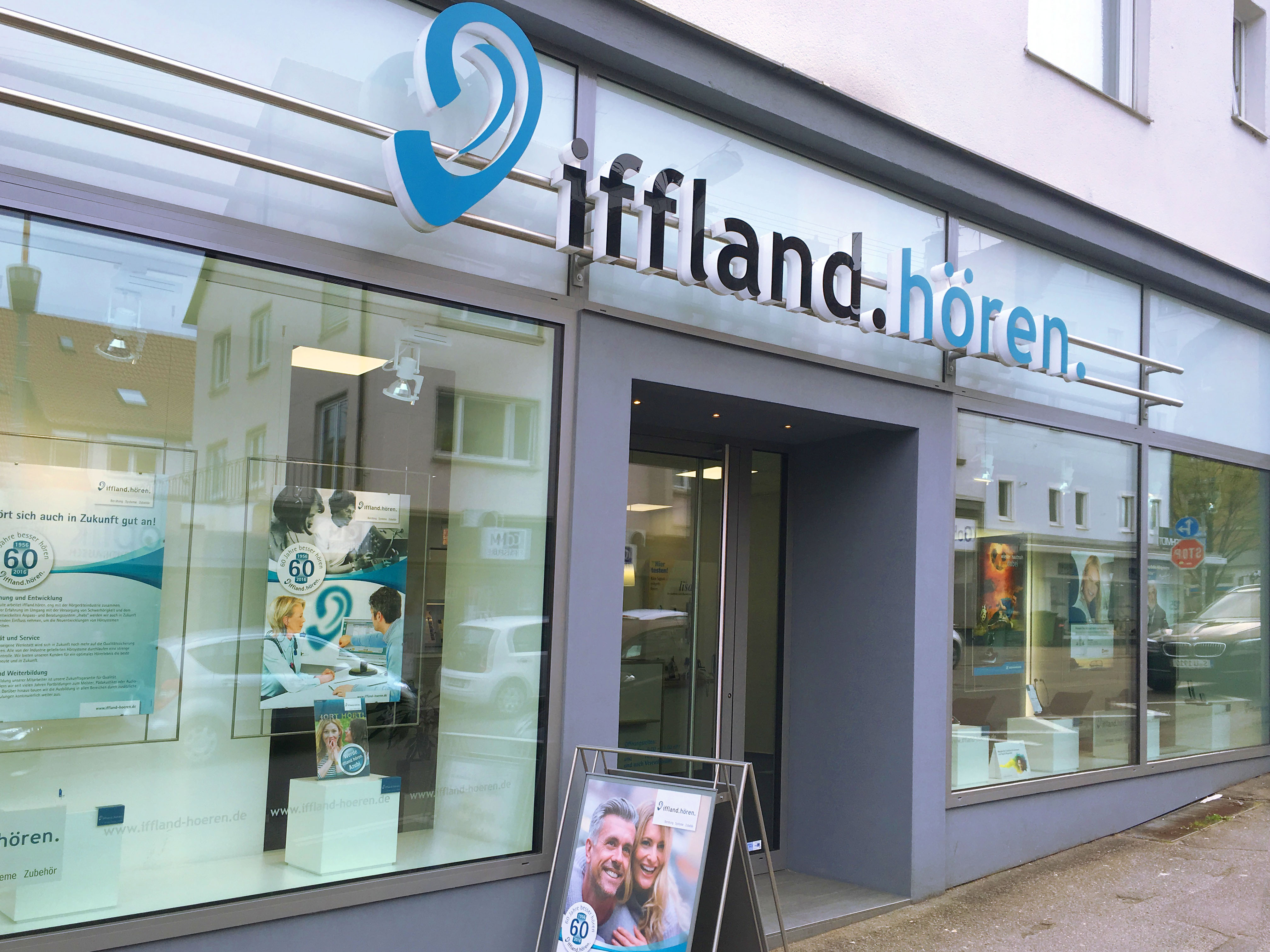 Iffland Hören Niederlassung Stuttgart-Degerloch, Baden-Württemberg, Deutschland